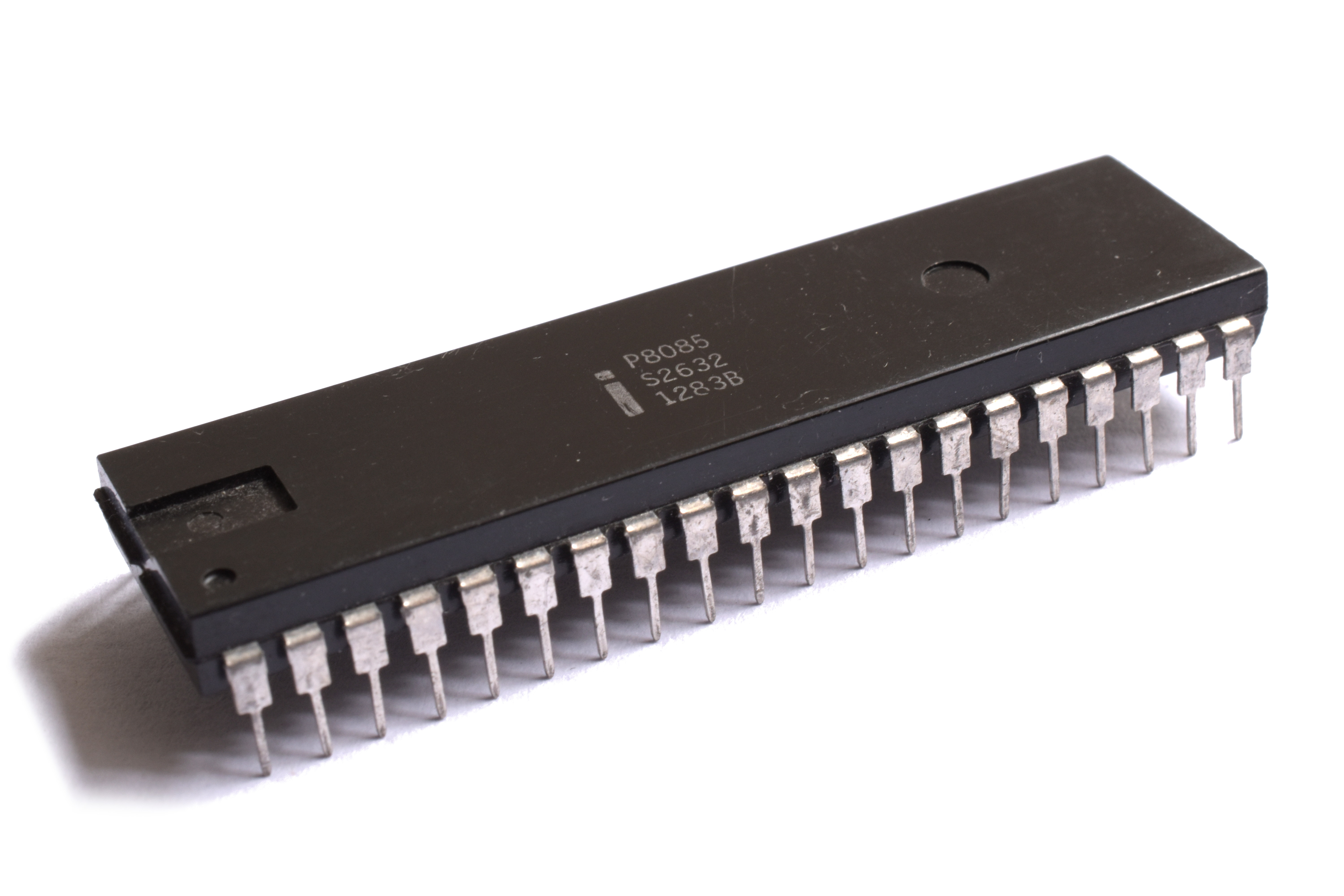 Procesoro Intel P8085.